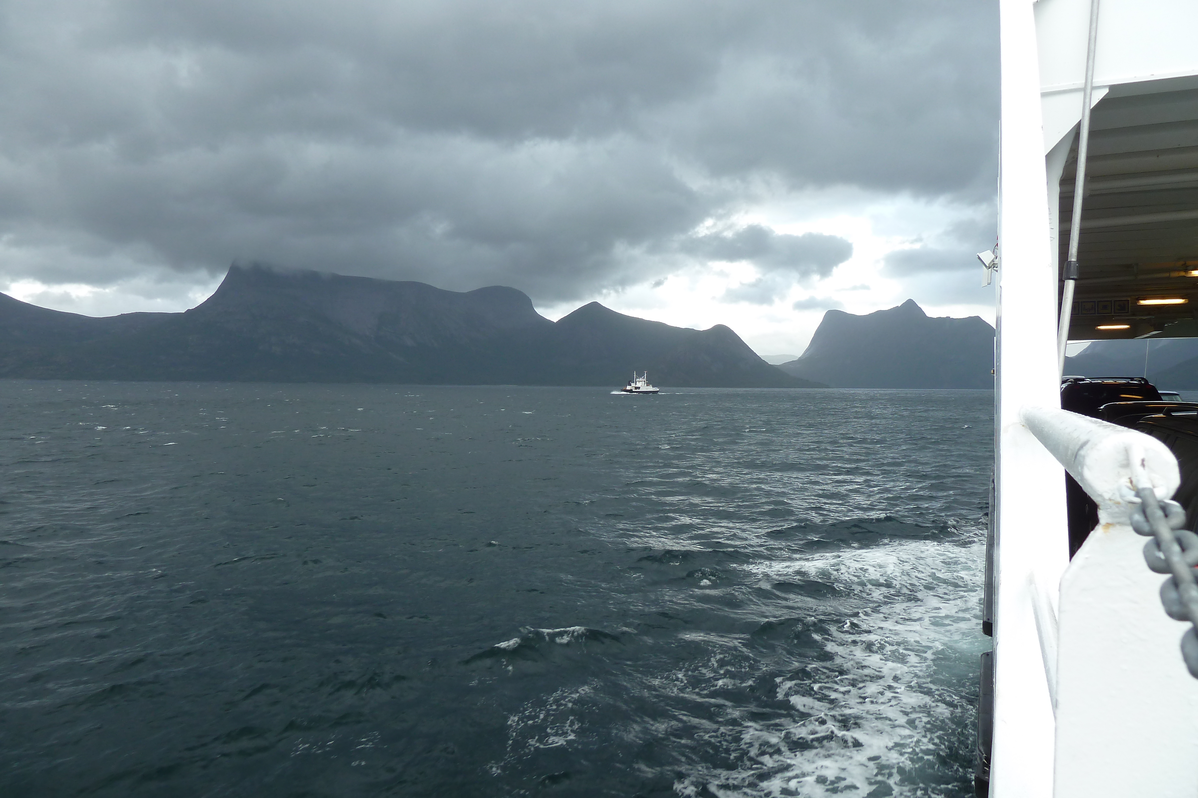 Midtfjords mellom Bognes og Skarberget på E6 i Nordland. Melshorn (på veg mot Skarberget) møter Godfjord (midt i bildet, på vei mot Bognes)